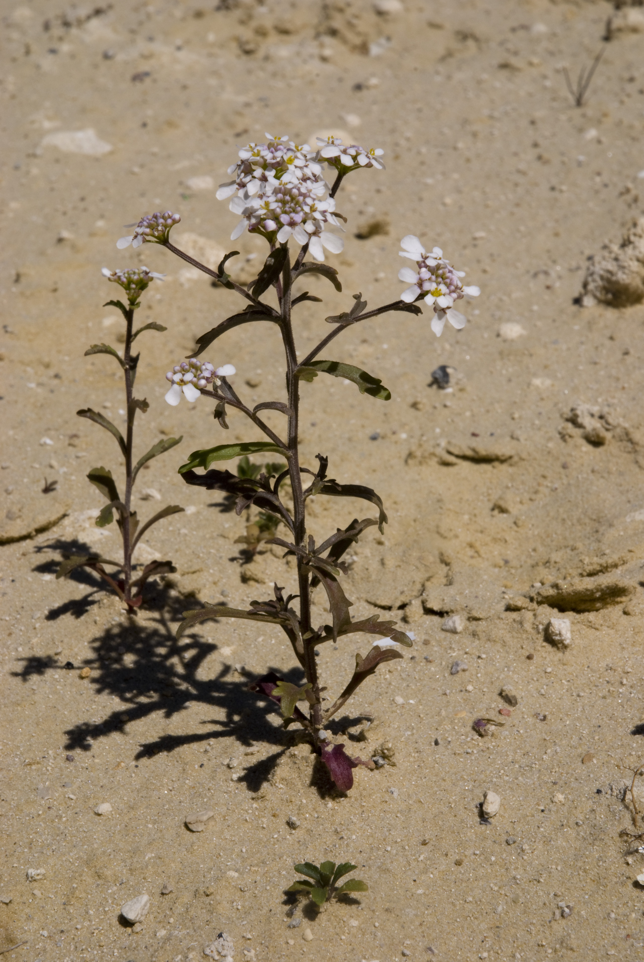 Iberis amara Carrière de Saint-vaast-les-mello (Oise), France